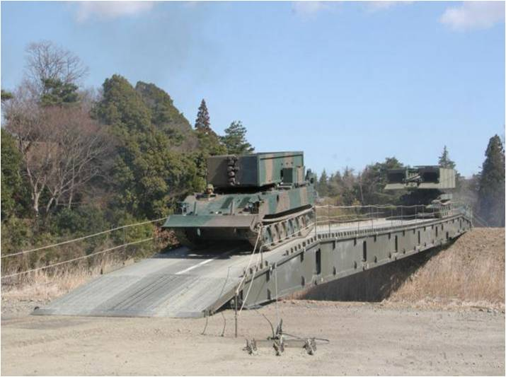 略称：07MSB ○橋節運搬車 [全長]11,000mm [全幅]3,000mm [全高]3,700mm [全備重量]25,000kg [乗員]3名 [最高速度]85km/h [開発]防衛省技術研究本部 [製作]日立製作所 ８1式自走架柱橋の後継として施設科部隊に装備し、作戦地域の河川、地隙等に架設して、第一線部隊等の機動を容易にする。 単径間橋であるため、河川の流速及び河床土質の影響を受けることなく架設が可能である。